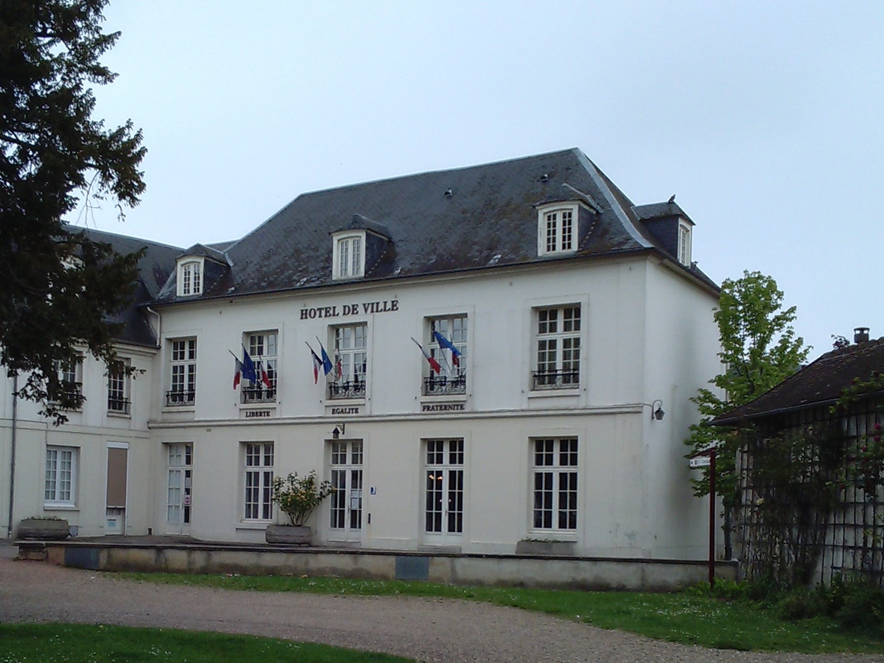 L'hôtel de ville de Gaillon (27)